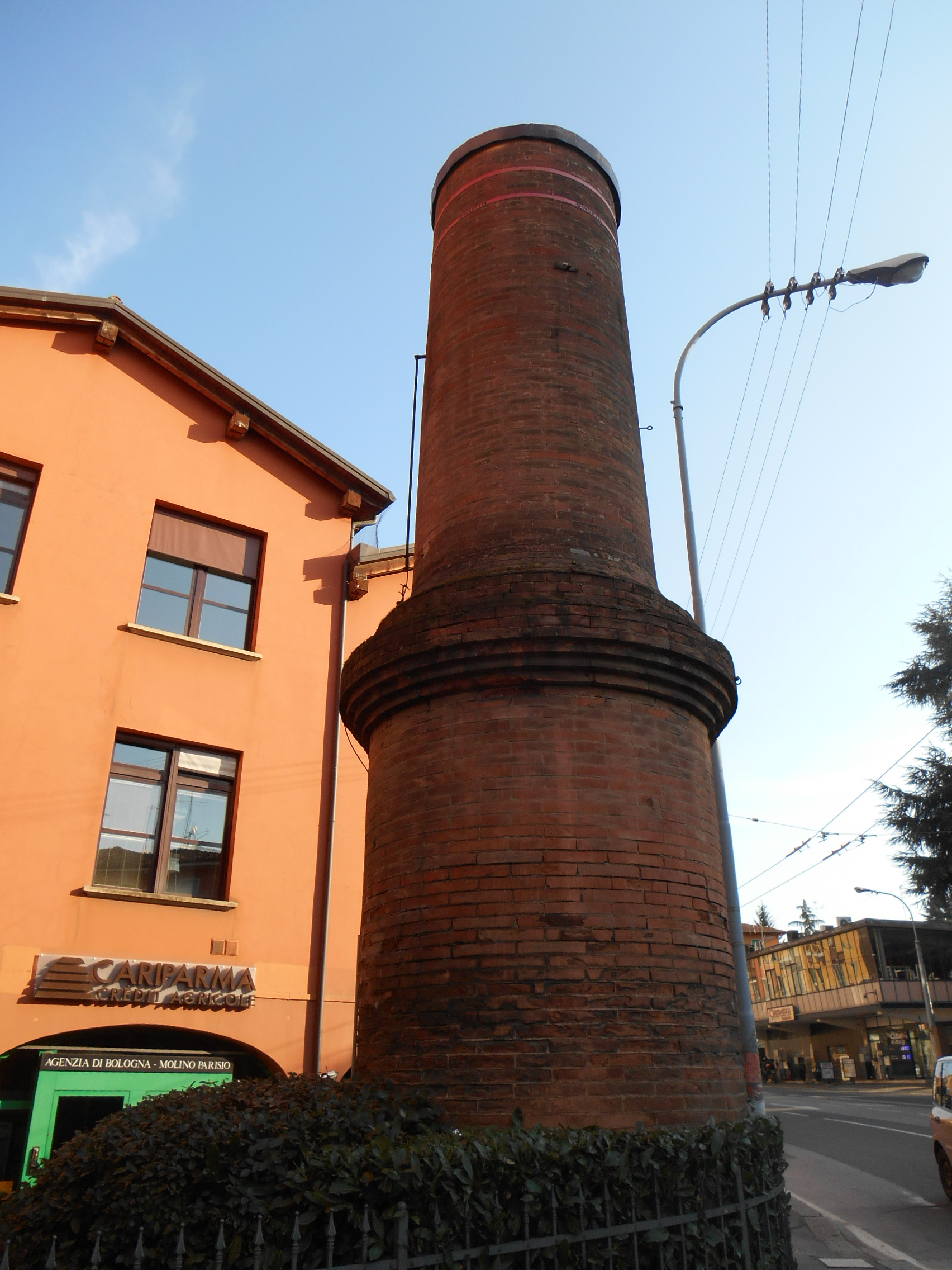 Ciminiera del Mulino Parisio dopo la demolizione del 2012